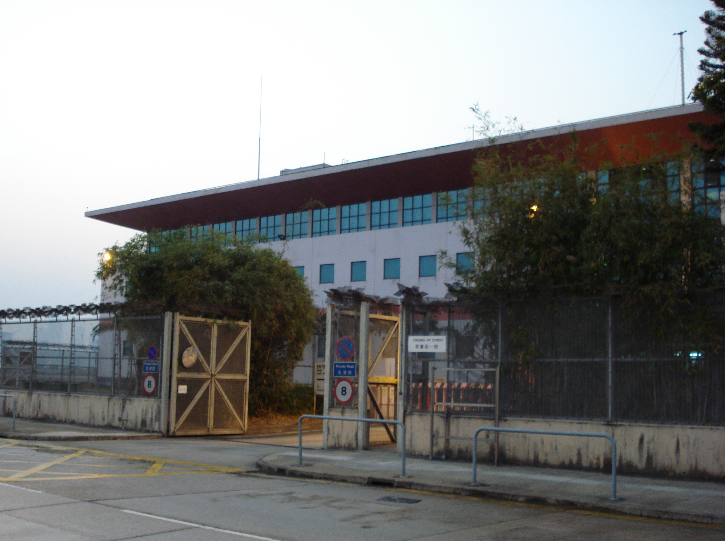 Former GFS HQ